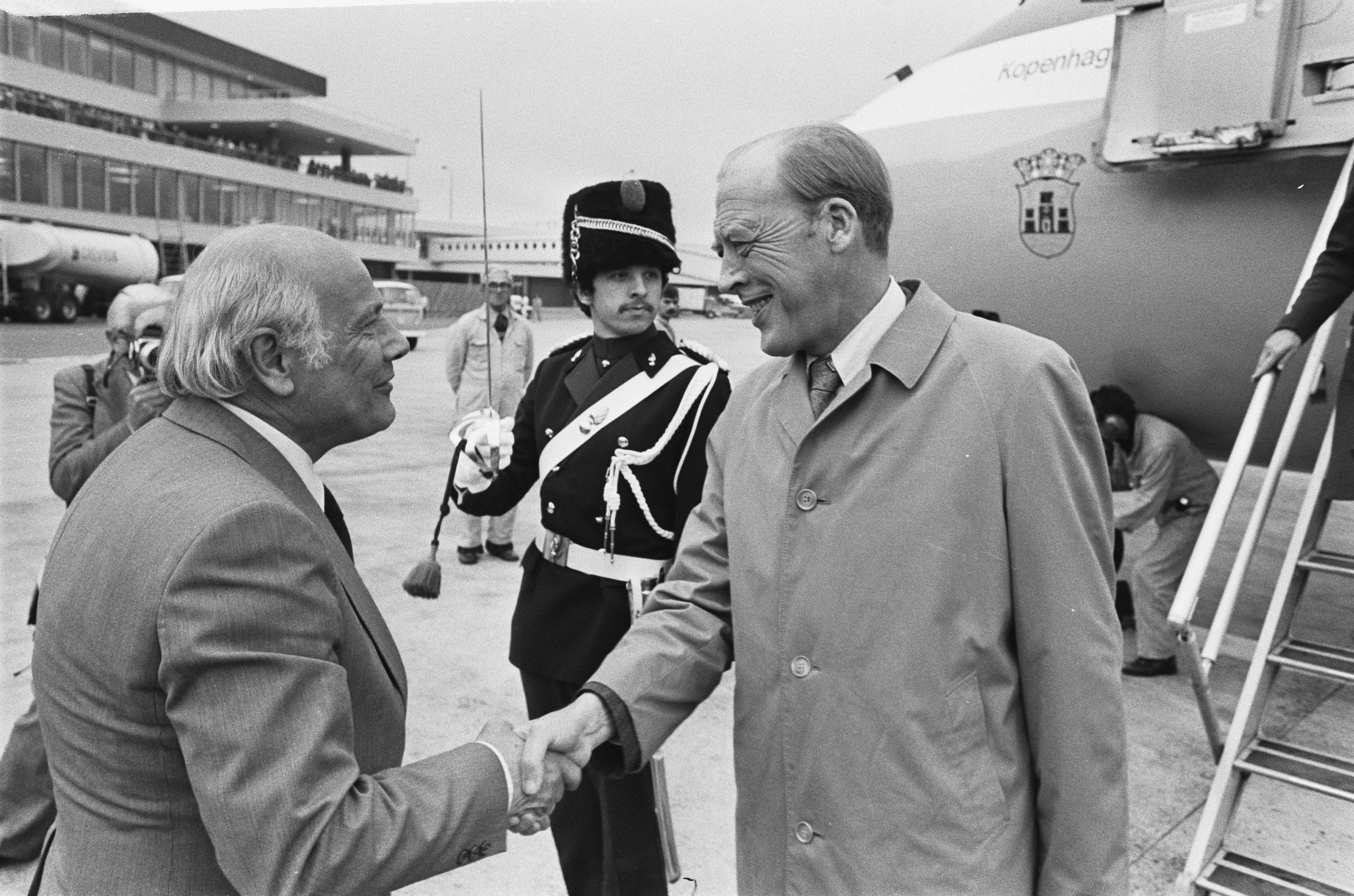 Collectie / Archief : Fotocollectie Anefo Reportage / Serie : [ onbekend ] Beschrijving : Aankomst Noorse premier Nordli op Schiphol; Den Uyl begroet Nordli Datum : 10 oktober 1976 Trefwoorden : aankomsten, premiers Persoonsnaam : Nordli, Odvar, Uyl, Joop den Fotograaf : Verhoeff, Bert / Anefo Auteursrechthebbende : Nationaal Archief Materiaalsoort : Negatief (zwart/wit) Nummer archiefinventaris : bekijk toegang 2.24.01.05 Bestanddeelnummer : 928-8219